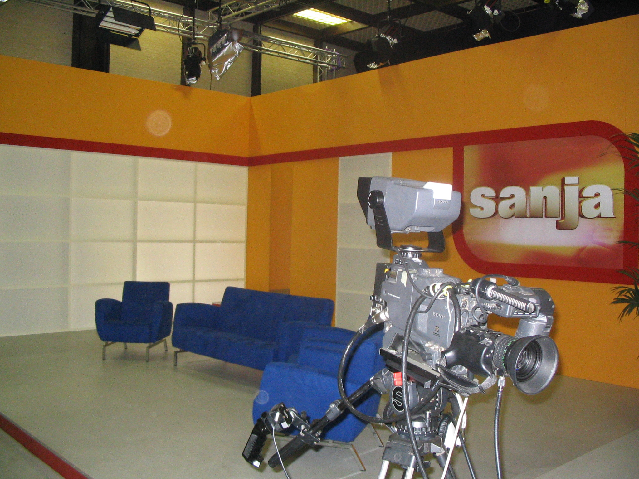 RTL Televizija: Sanja show studio